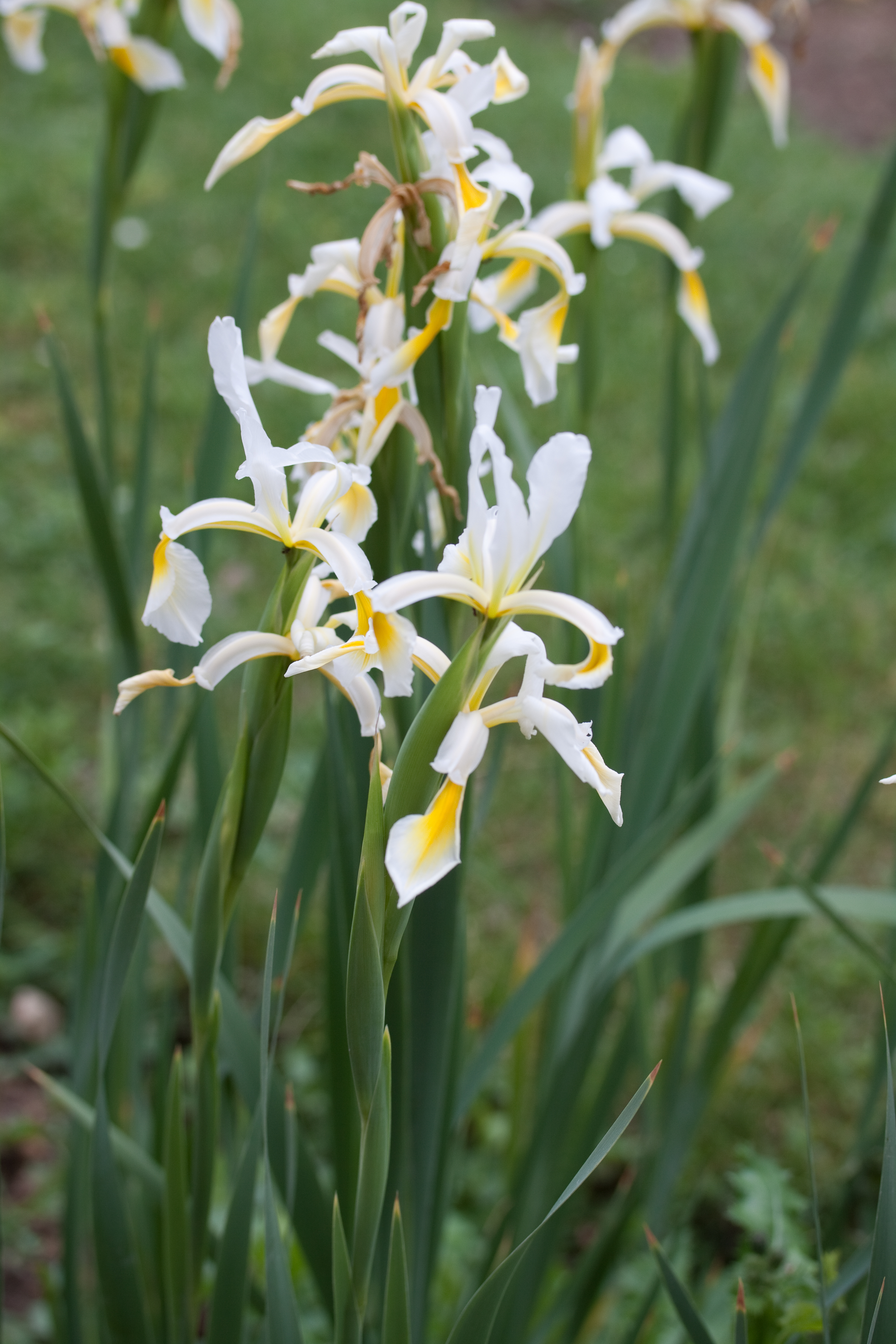 Fleurs d'Iris orientalis au Jardin des Plantes - Paris